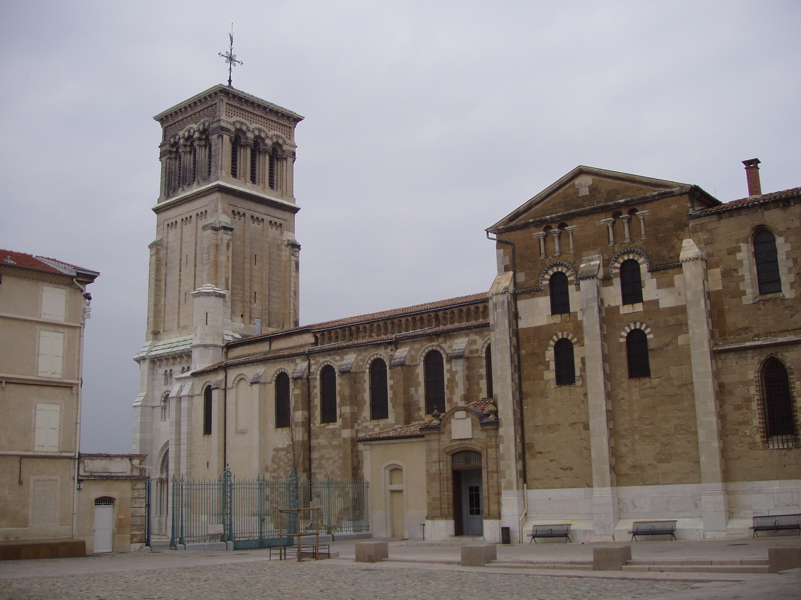 Cathédrâle Saint-Apollinaire de Valence (Drôme), vu de la Place des Ormeaux